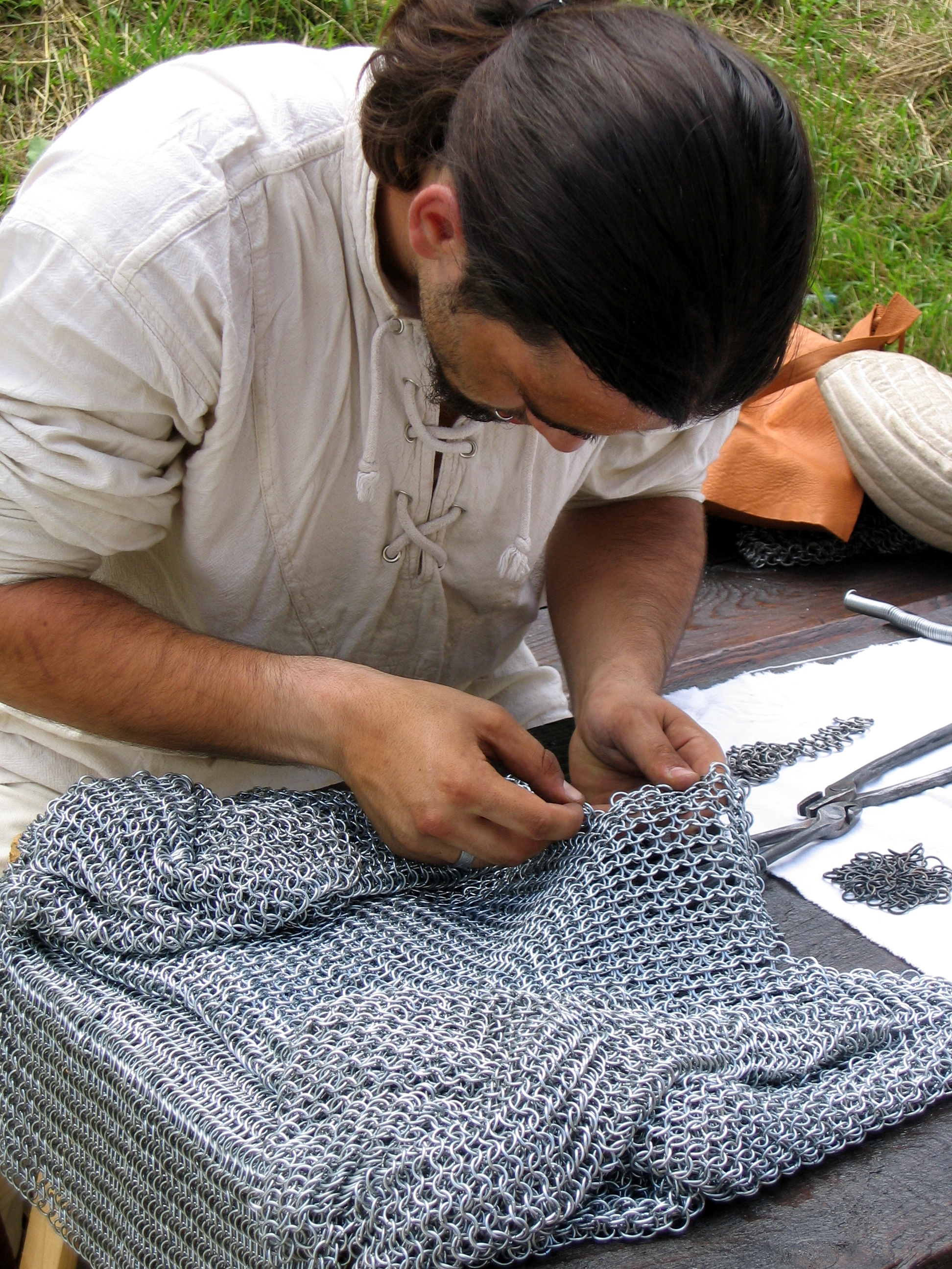 Fabrication d'une cotte de mailles